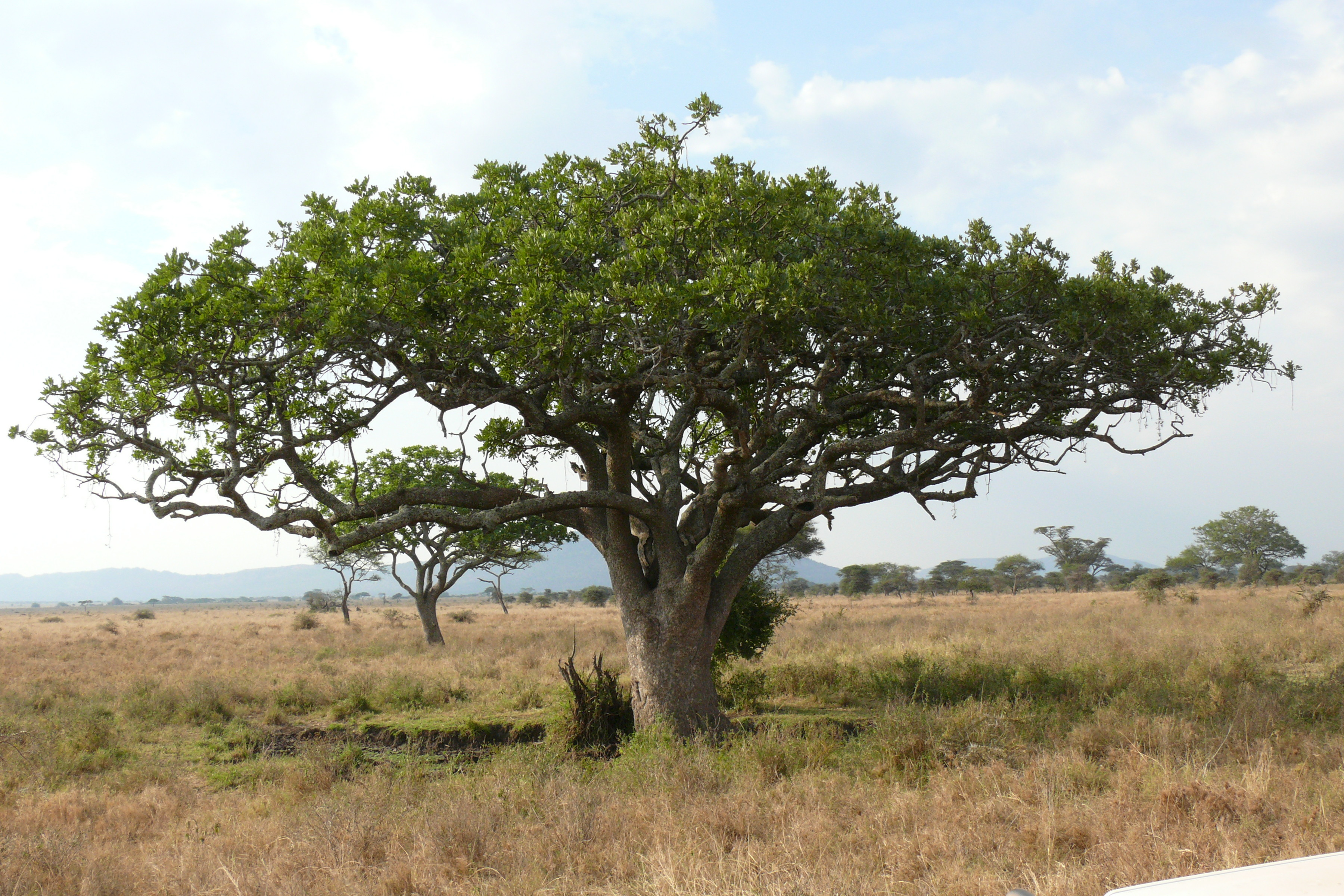 Leberwurstbaum (Kigelia africana)